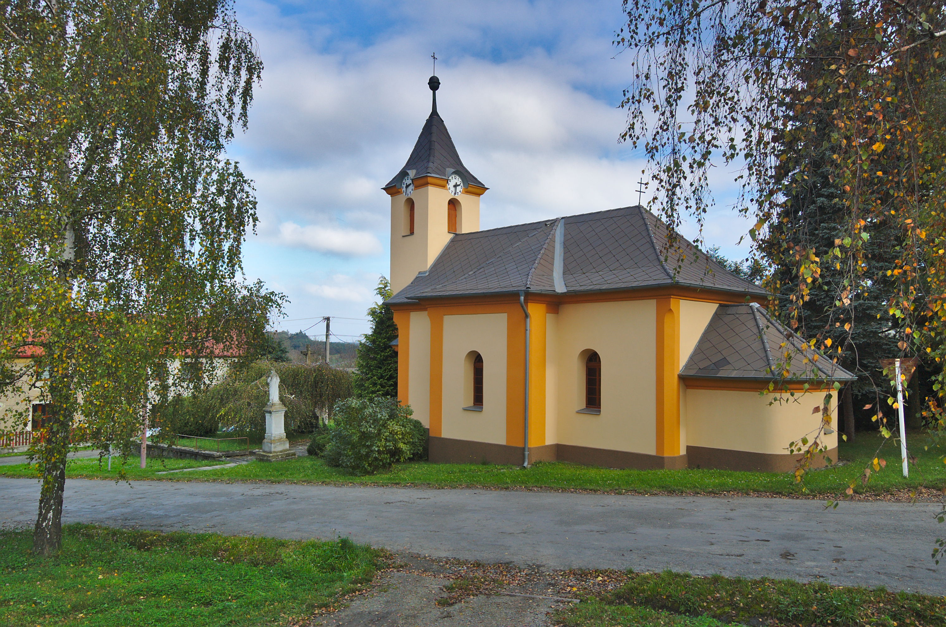 Kaple svaté Anny, Prostějovičky, okres Prostějov